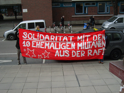 Proteste während des Prozesses gegen die ehemalige RAF-Terroristin Verena Becker